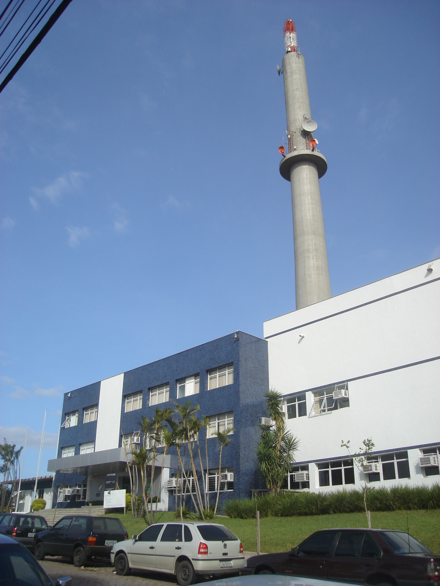 Sede da RBS TV Porto Alegre.